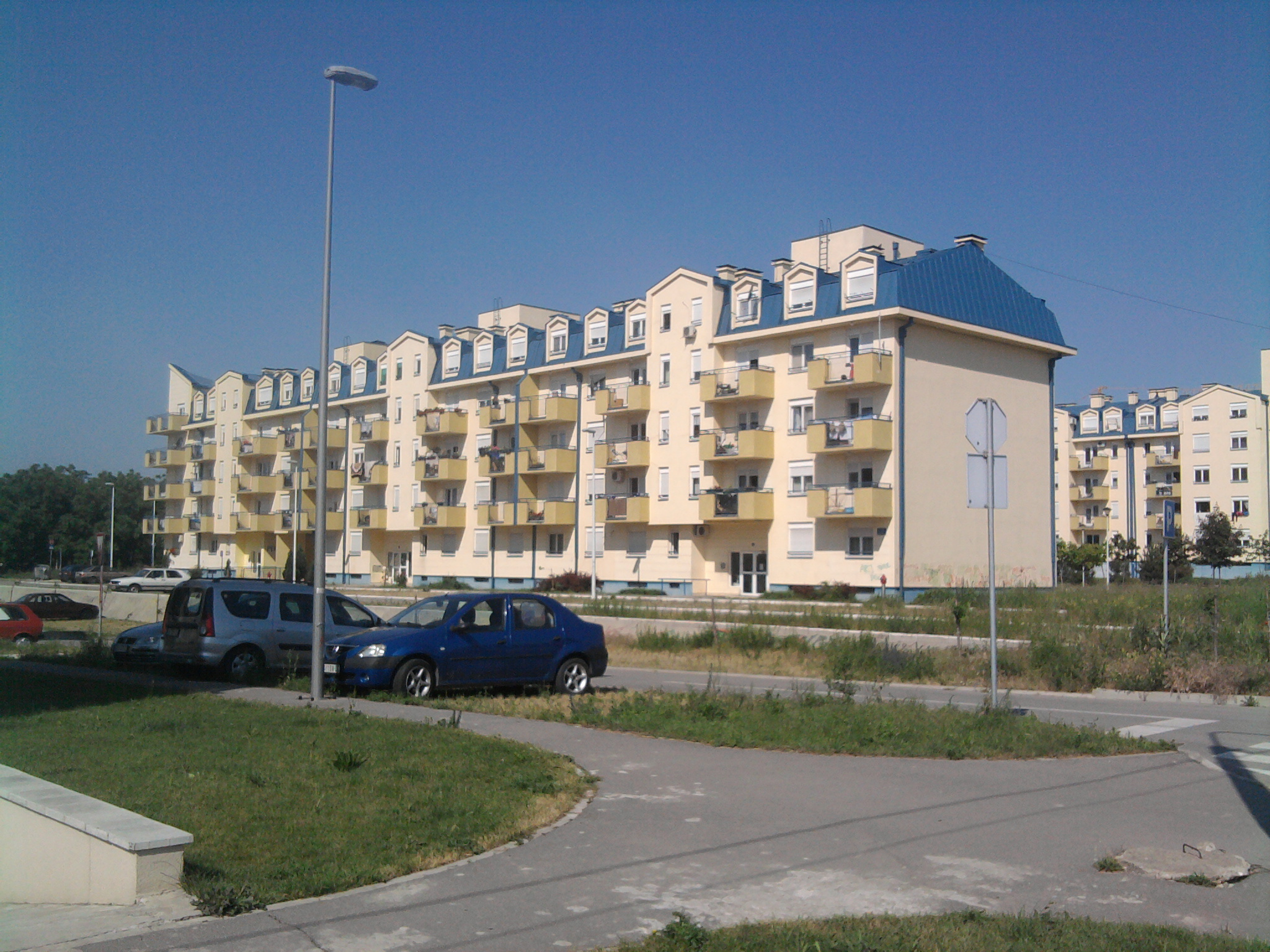 Zgrada u naselju Kamendin.